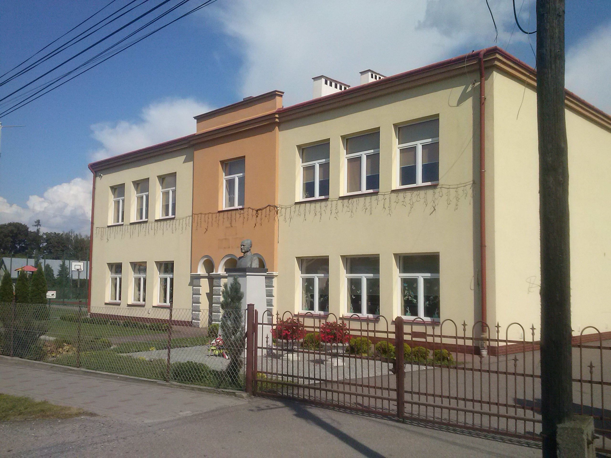 Szkoła Podstawowa im. gen. Antoniego Chruściela "Montera" w Gniewczynie Łańcuckiej